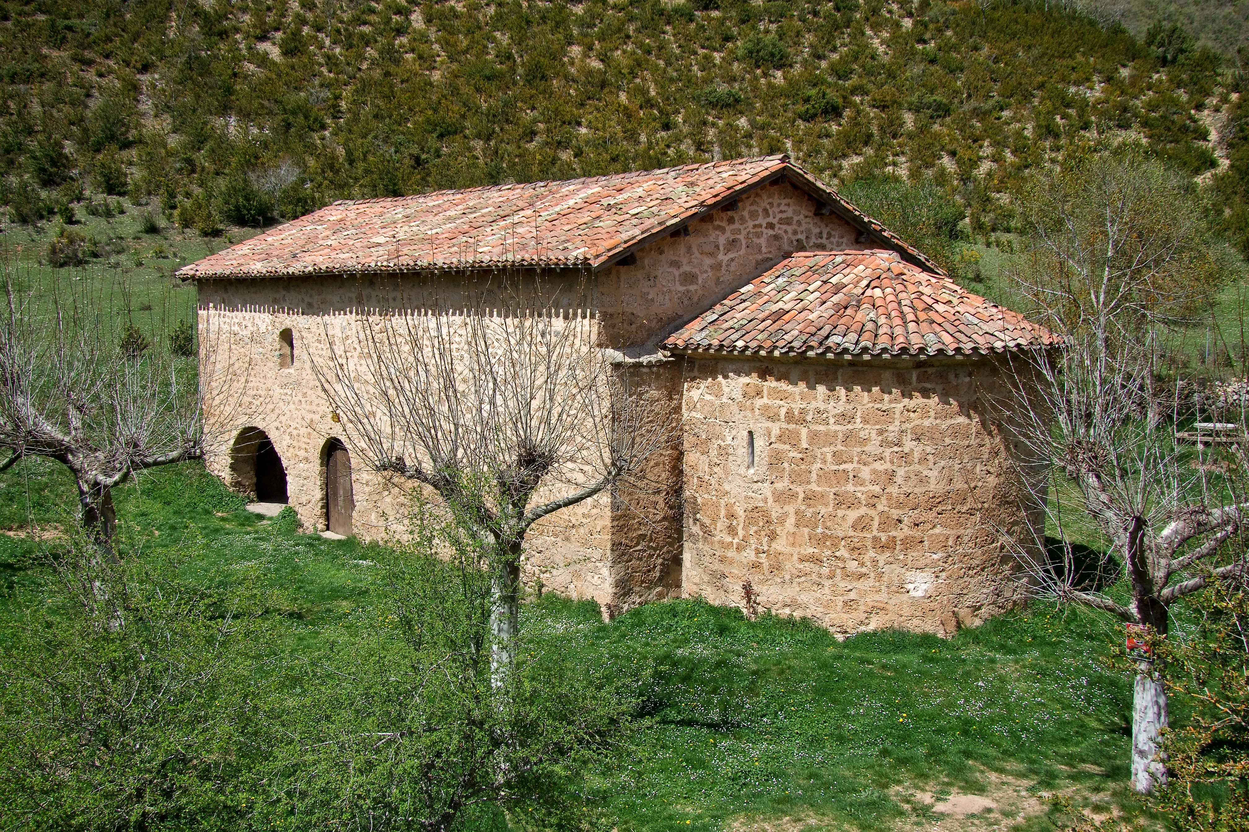 Ermita de San Pedro en la localidad de Torrecilla en Cameros, La Rioja - España